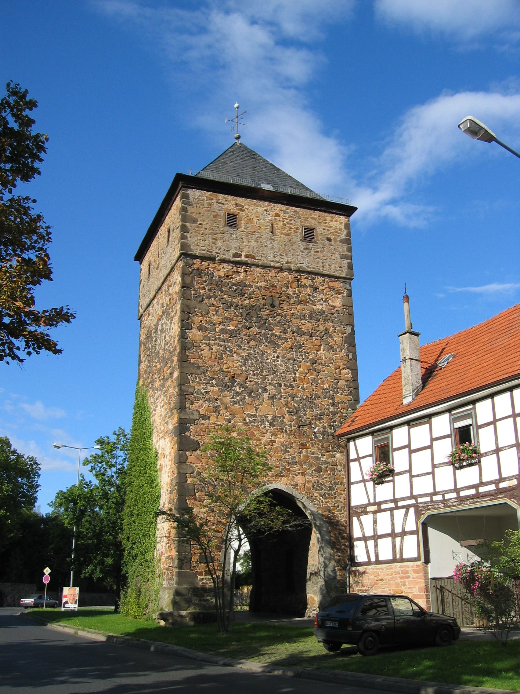 Die "Poart" - das Wiesecker Wahrzeichen - aufgenommen am 17.09.2005